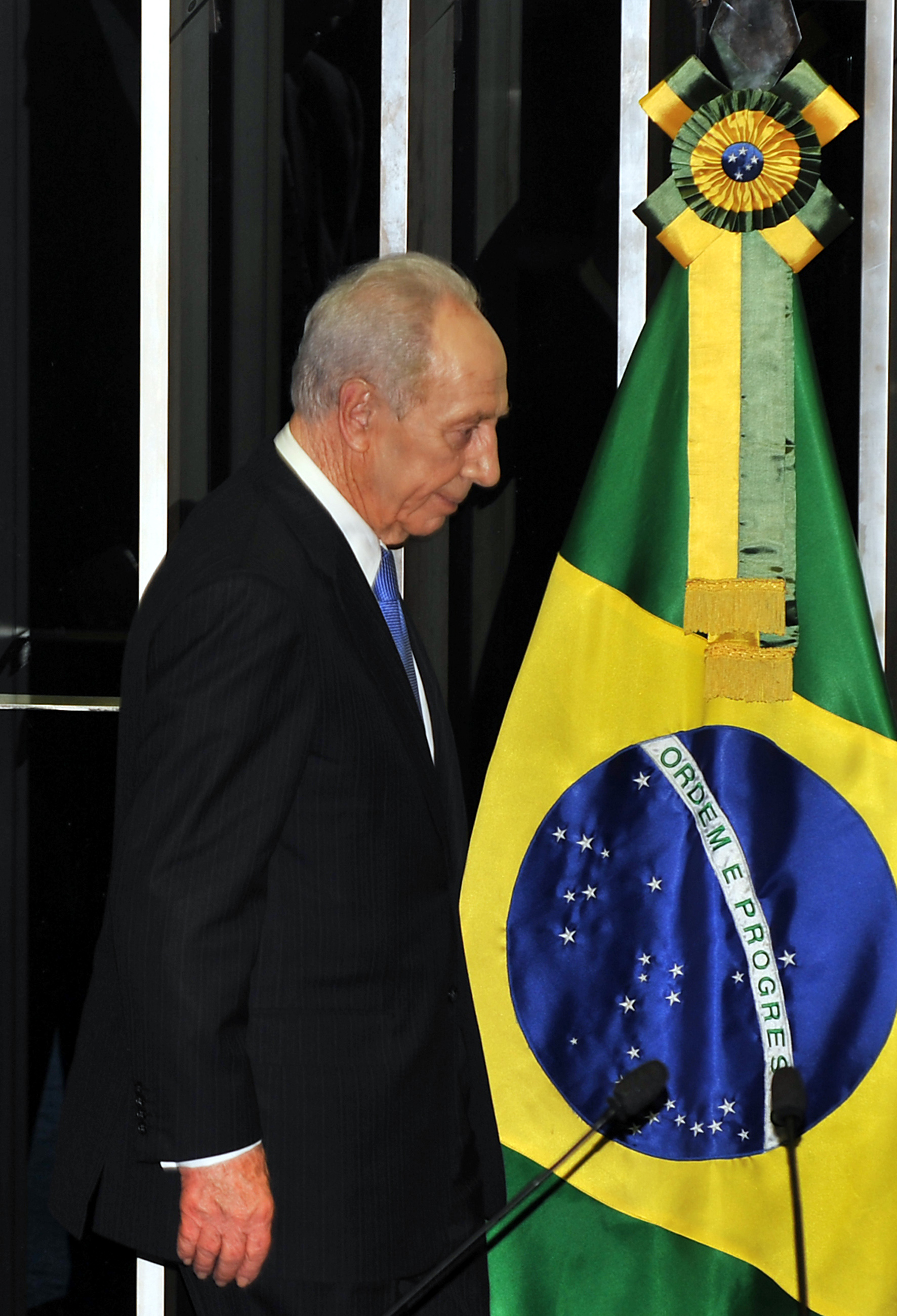 O presidente de Israel, Shimon Peres, na saída do plenário após visita oficial